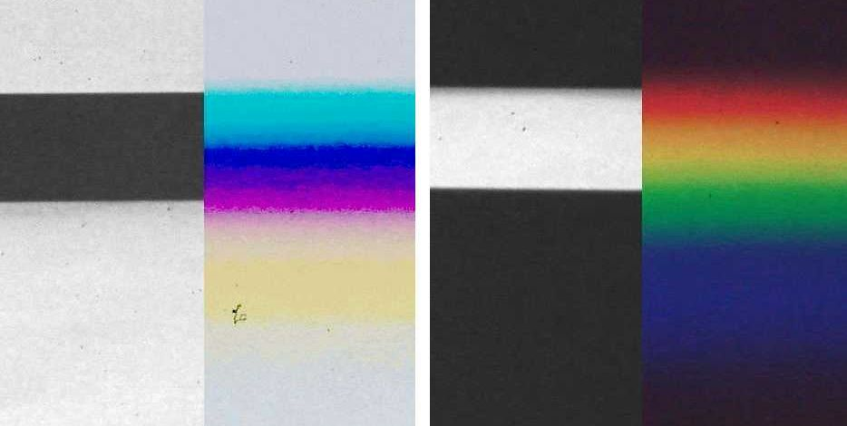 Ausschnitt aus Kantenspektrum1.jpg